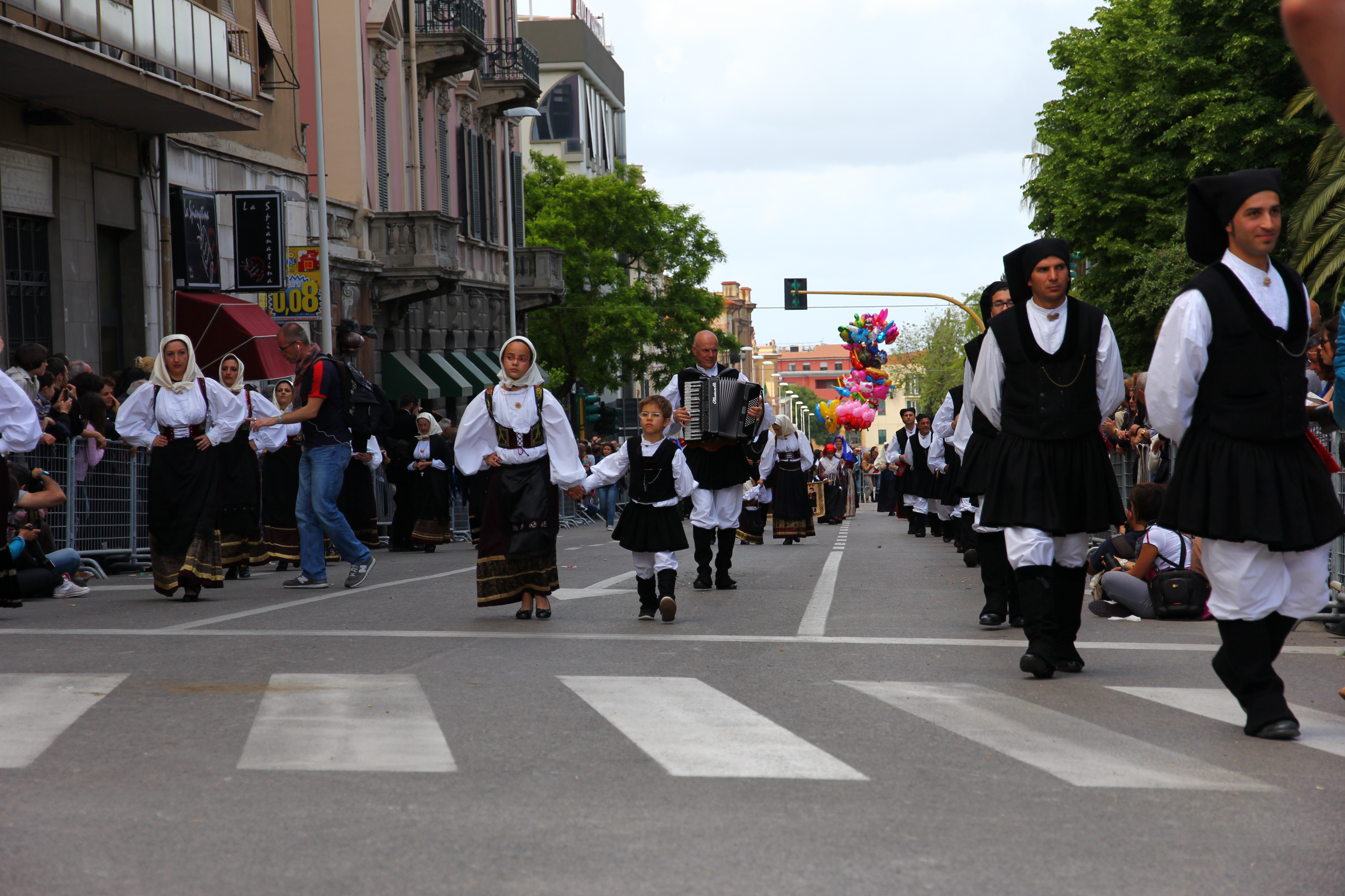 Cavalcata Sarda 2013 (Sassari)